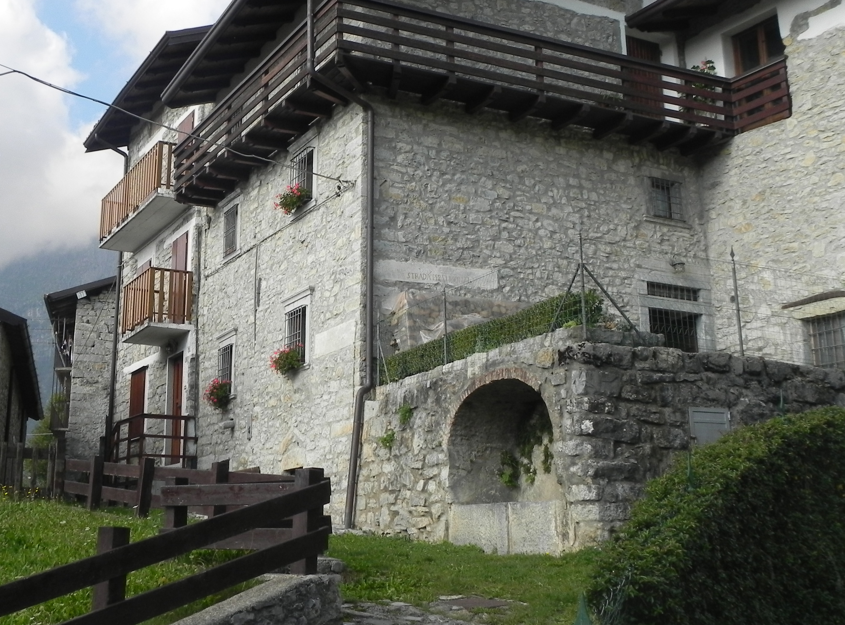 Contrada Peroli alti a Gorno BG Italy